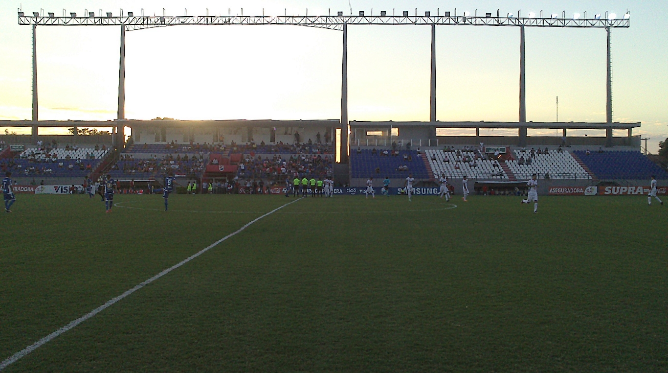 Vista del sector preferencial del estadio Arsenio Erico, del Club Nacional. Asunción - Paraguay.